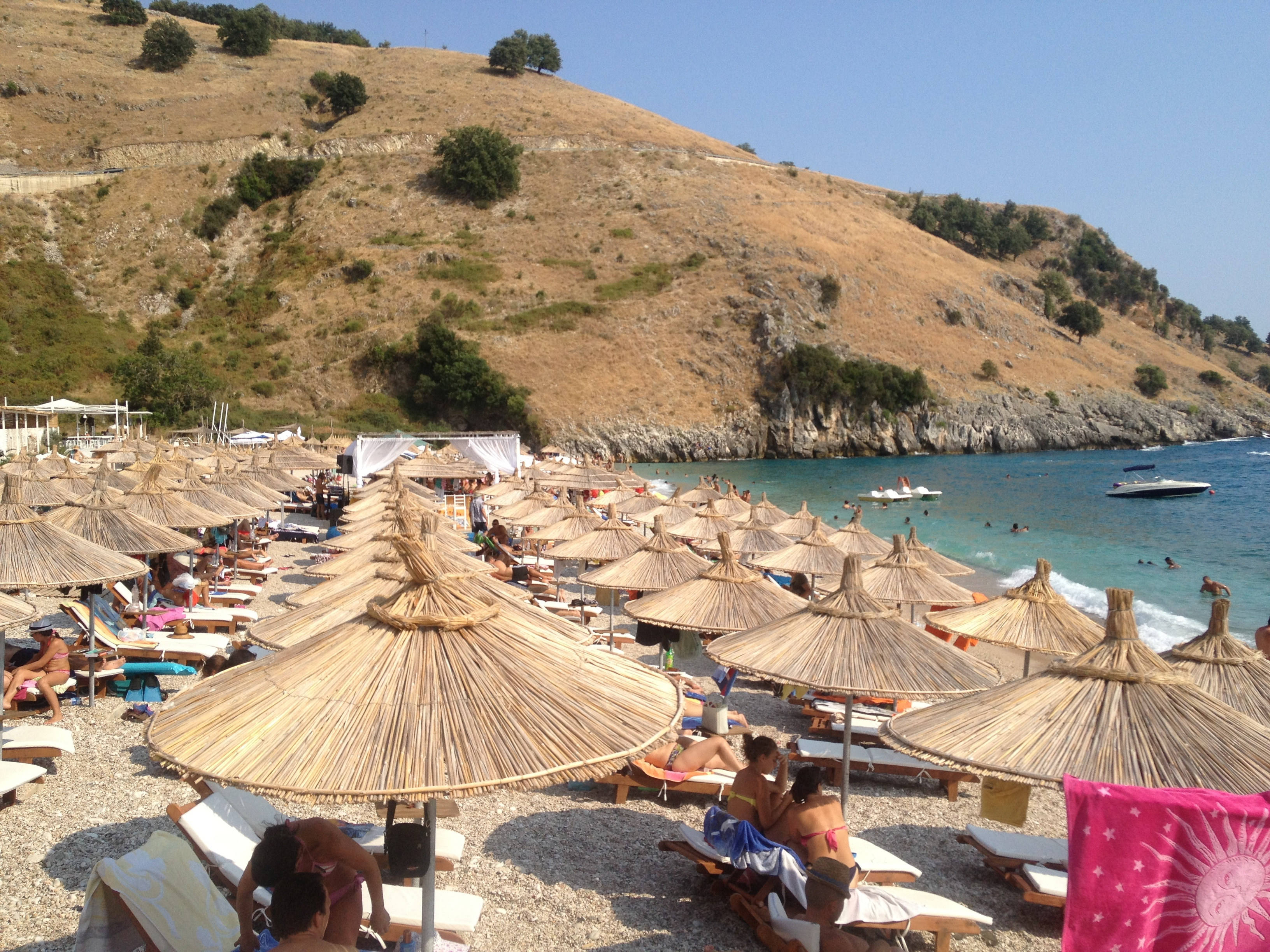 Llamani beach Saranda Albania